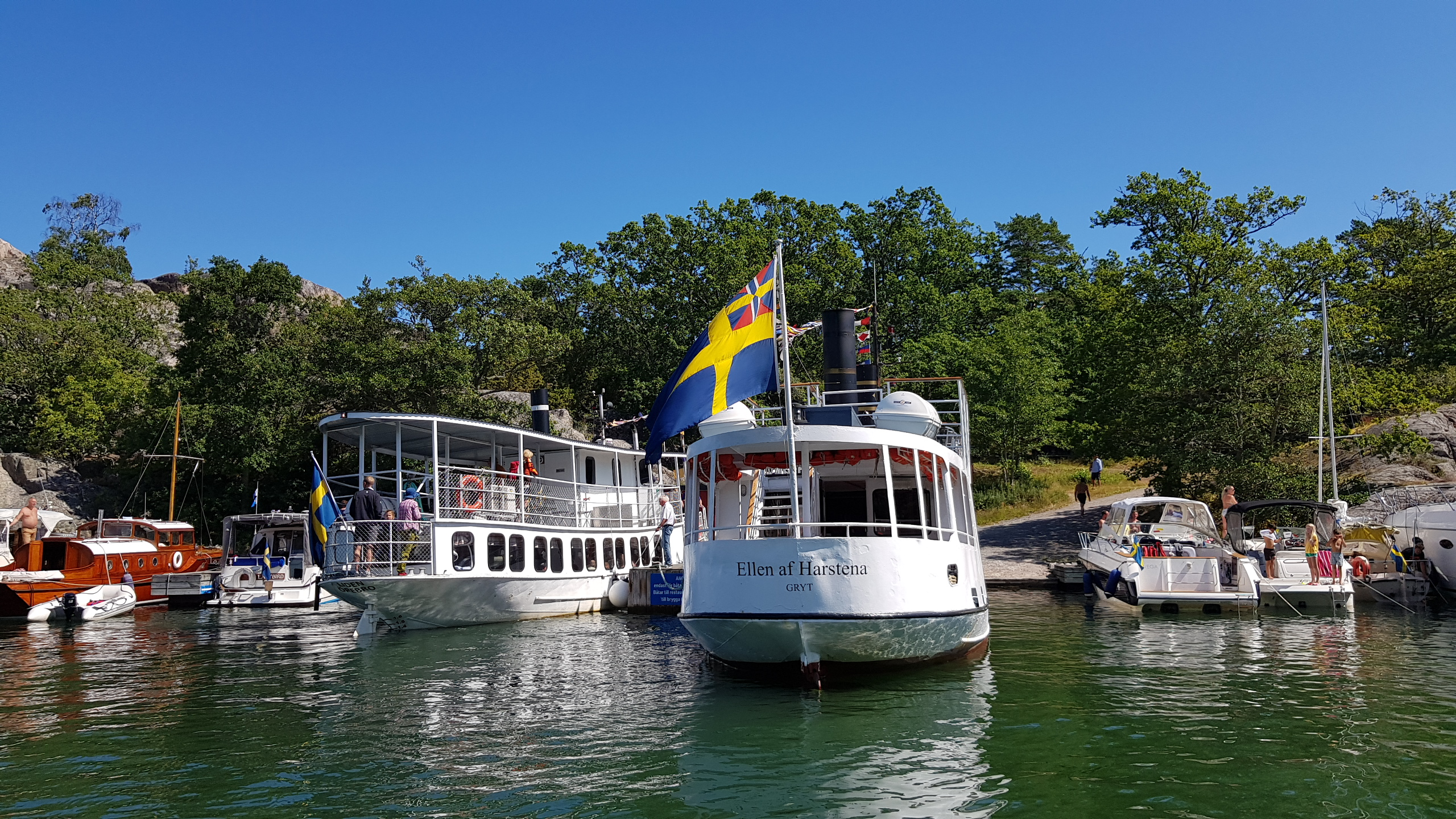 Skärgårdskompaniets båtar i Harstenas hamn